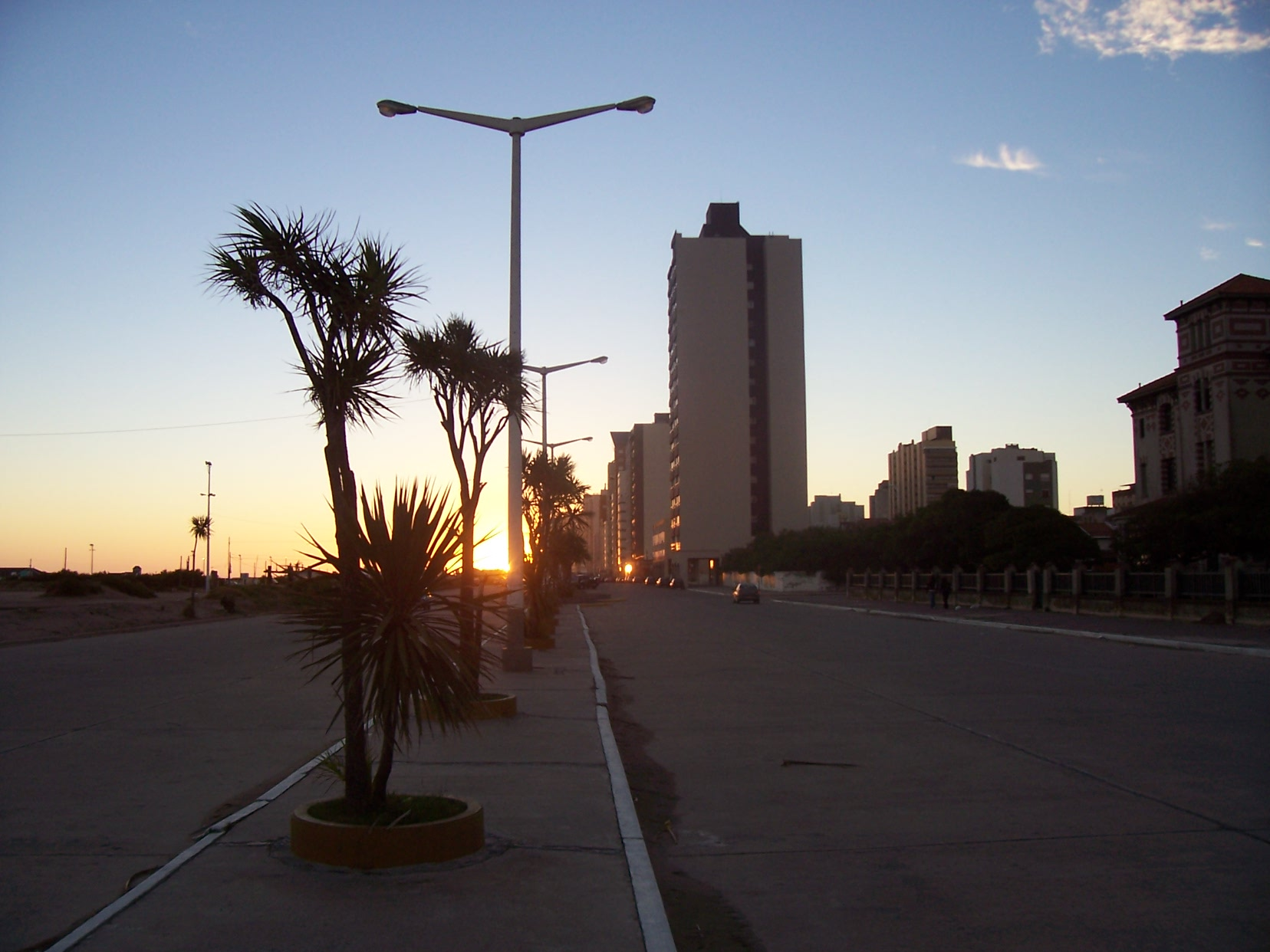 Un atardecer en la avenida n° 2 de la ciudad de Necochea, Argentina.